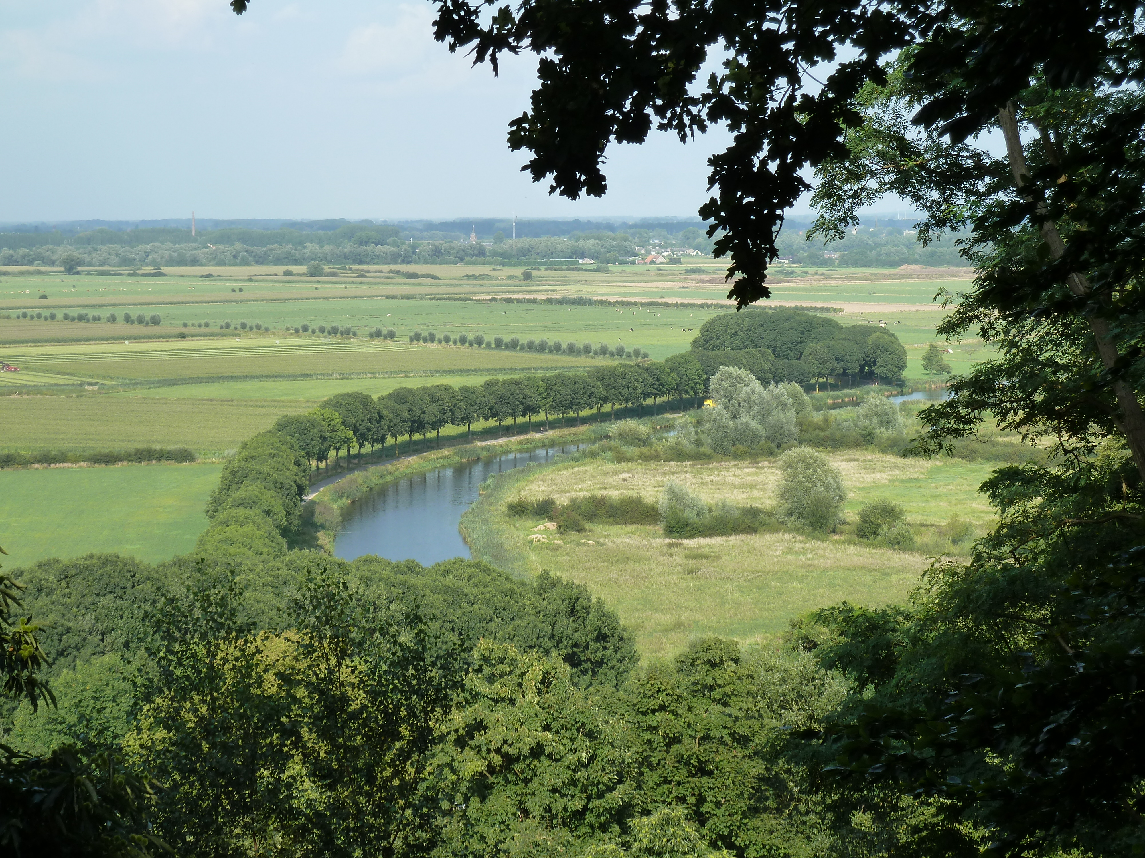 uitzicht vanaf Kops Plateau, Nijmegen, Nederland